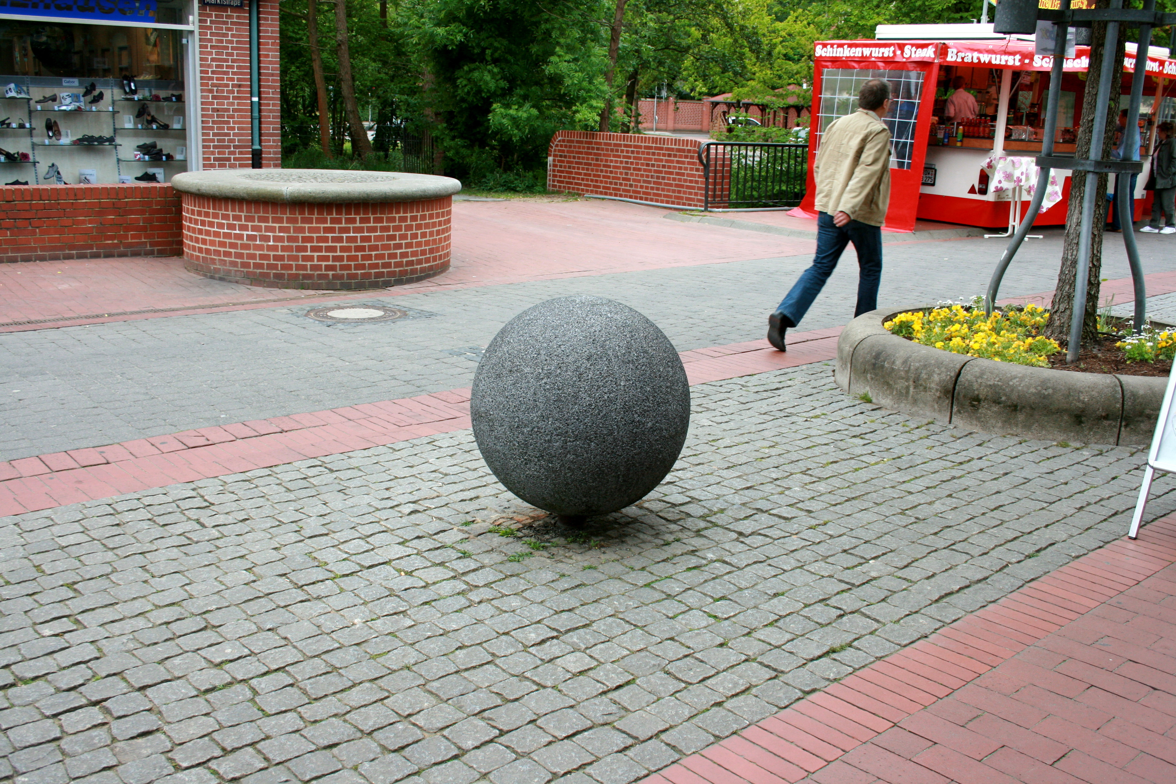 Marktstraße in Soltau